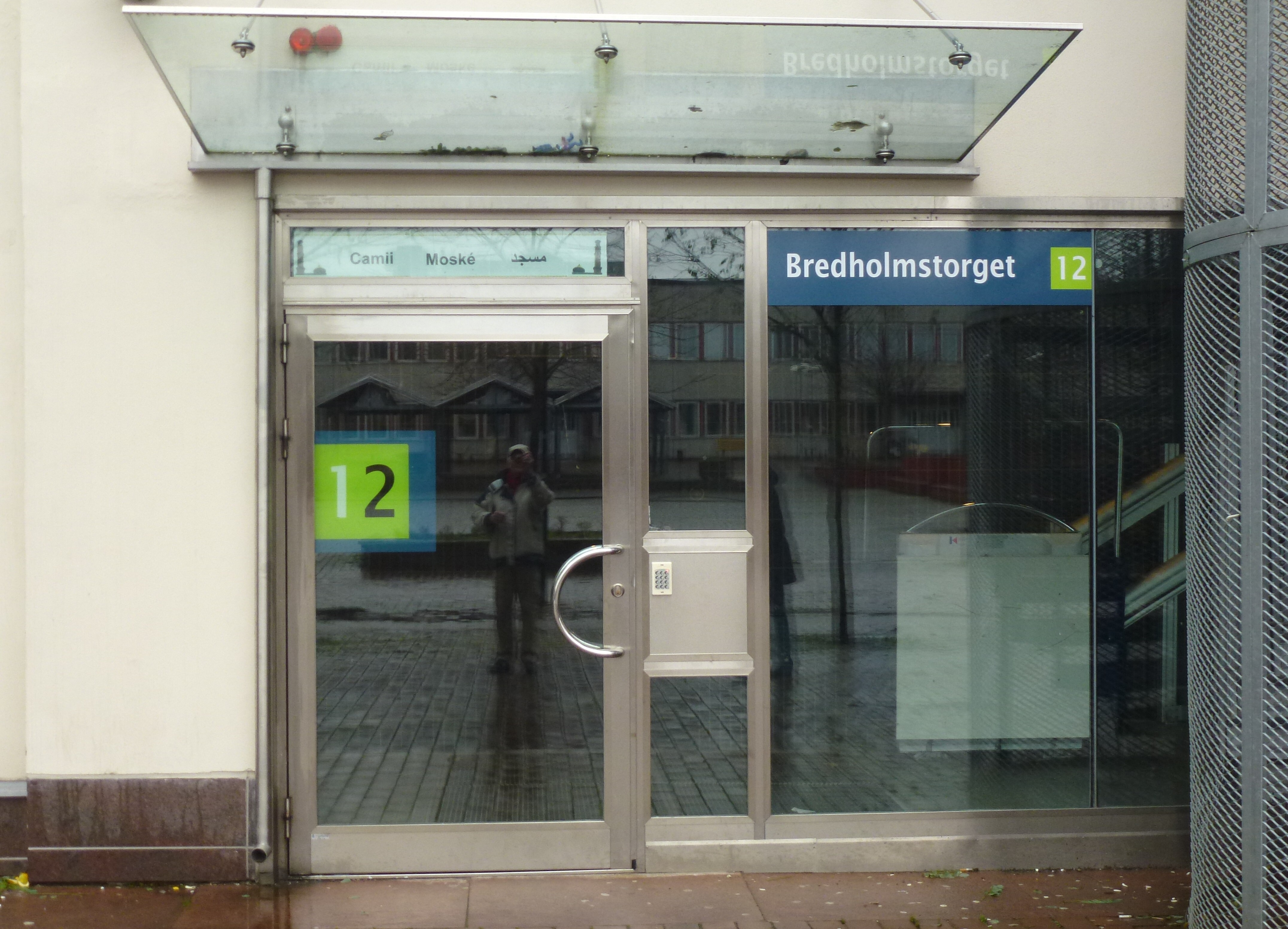 Skärholmens moské, entrén vid Bredholmstorget 12